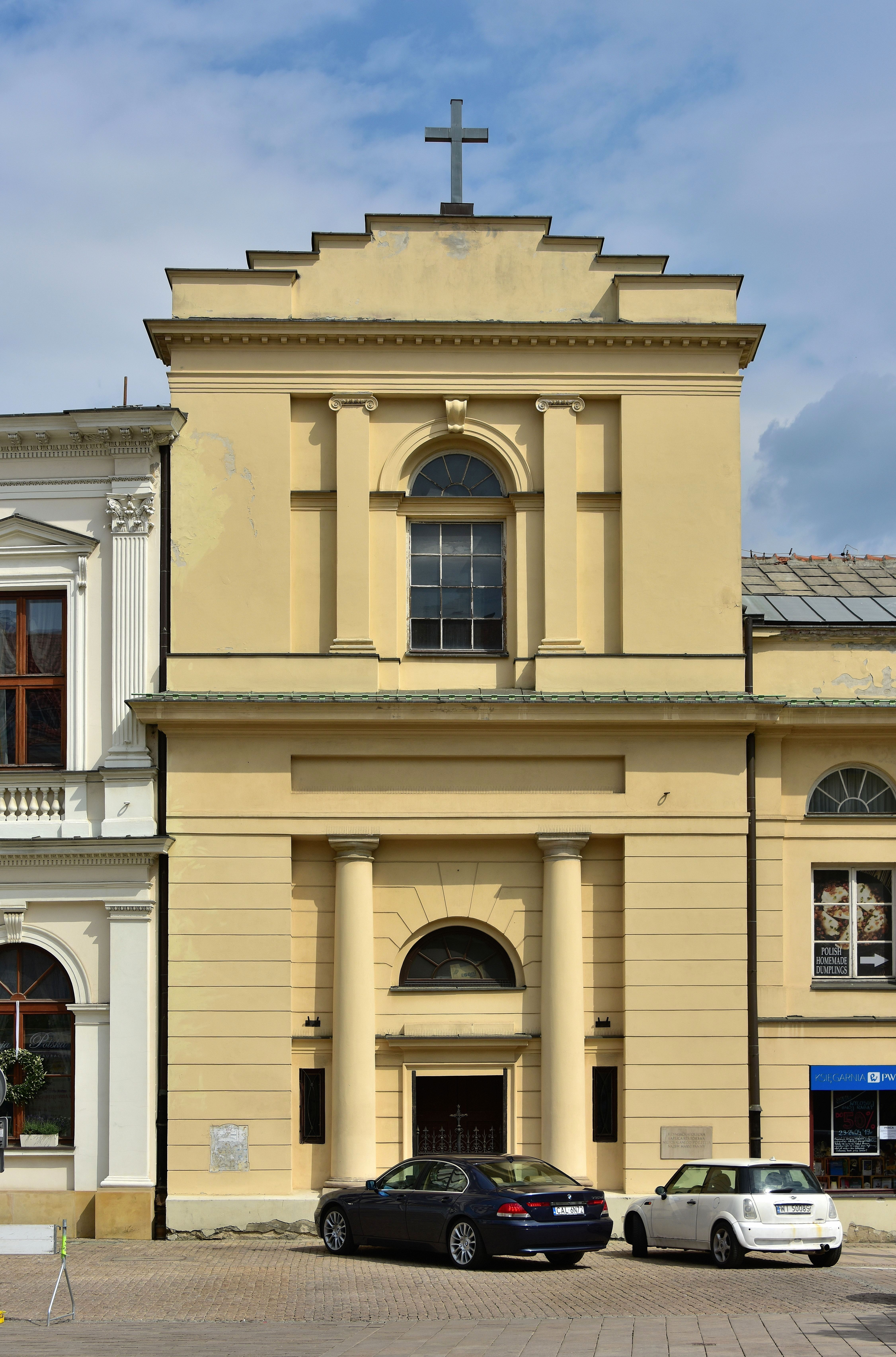 Kościół Niepokalanego Poczęcia Najświętszej Maryi Panny (Res Sacra Miser) przy ul. Krakowskie Przedmieście w Warszawie